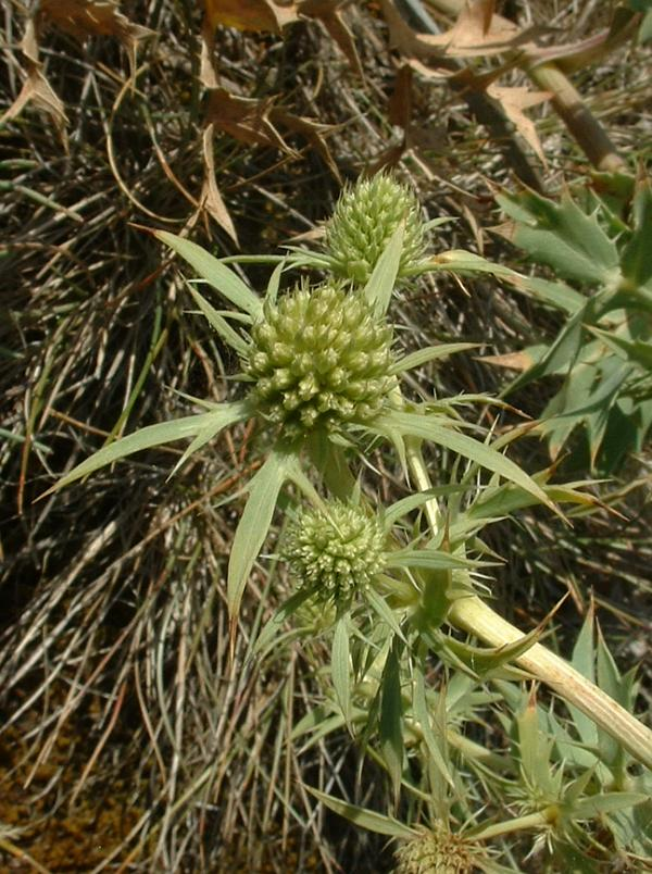 Panicaut champêtre, Talmont-Saint-Hilaire